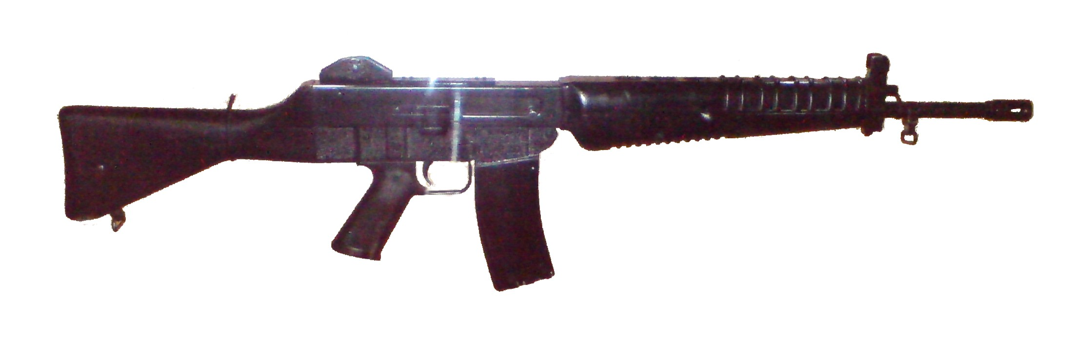 Vukovarska vojarna